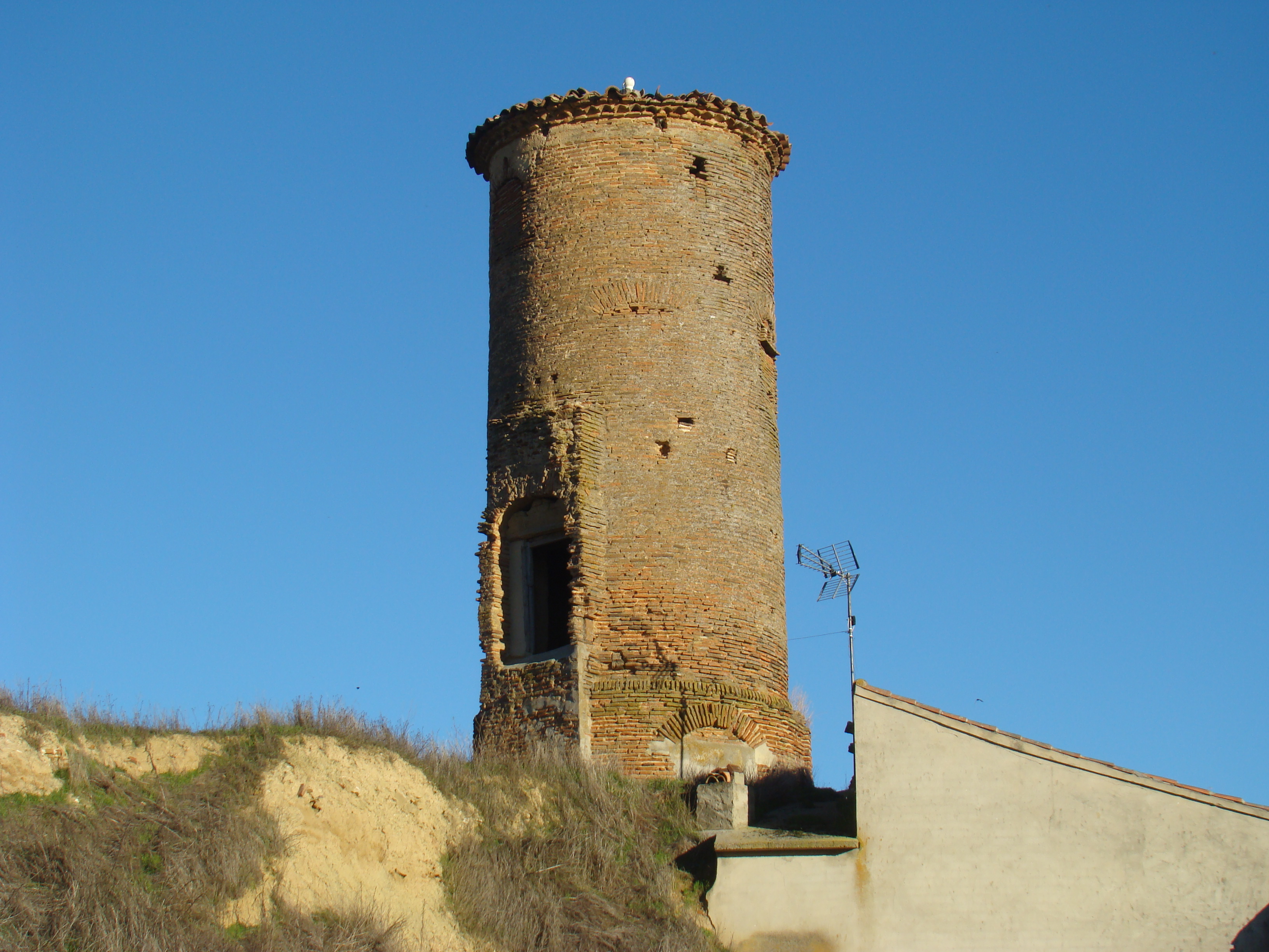 Villacid de Campos en la provincia de Valladolid, España. Atalaya de la antigua fortaleza, construcción de ladrillo, de planta circular, conocida como «el cubo».